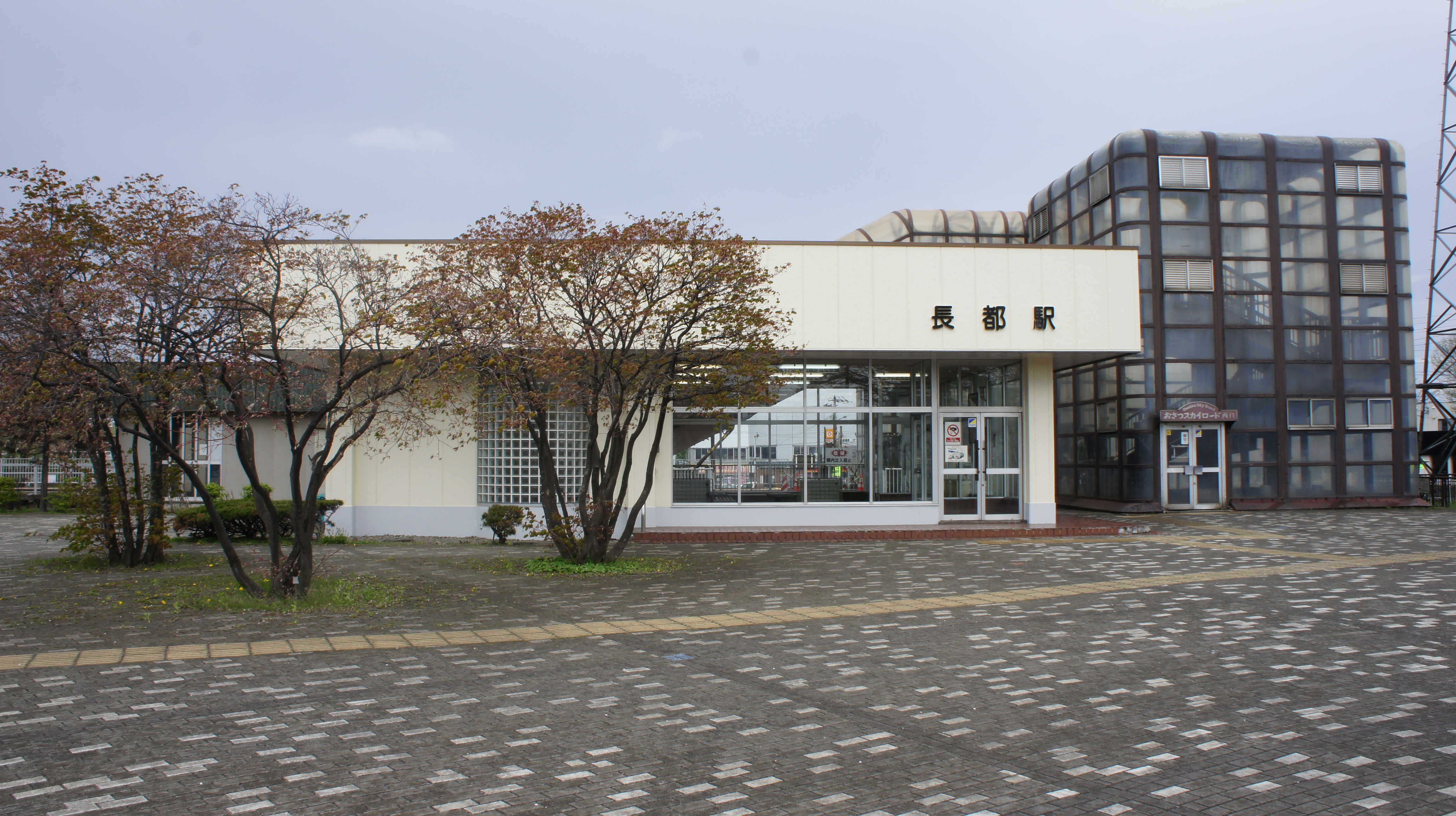 JR千歳線・長都駅の駅舎（西口） Sony NEX-3